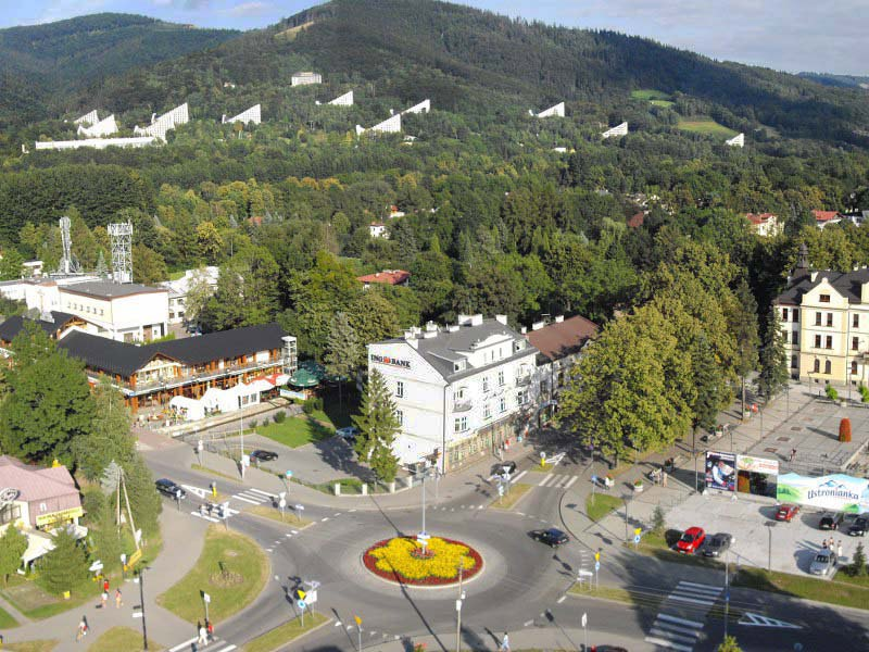 Luftaufnahme der Innenstadt von Ustron